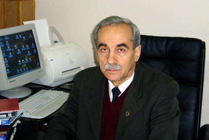 Коваленко Микола Павлович — академік АН вищої школи України